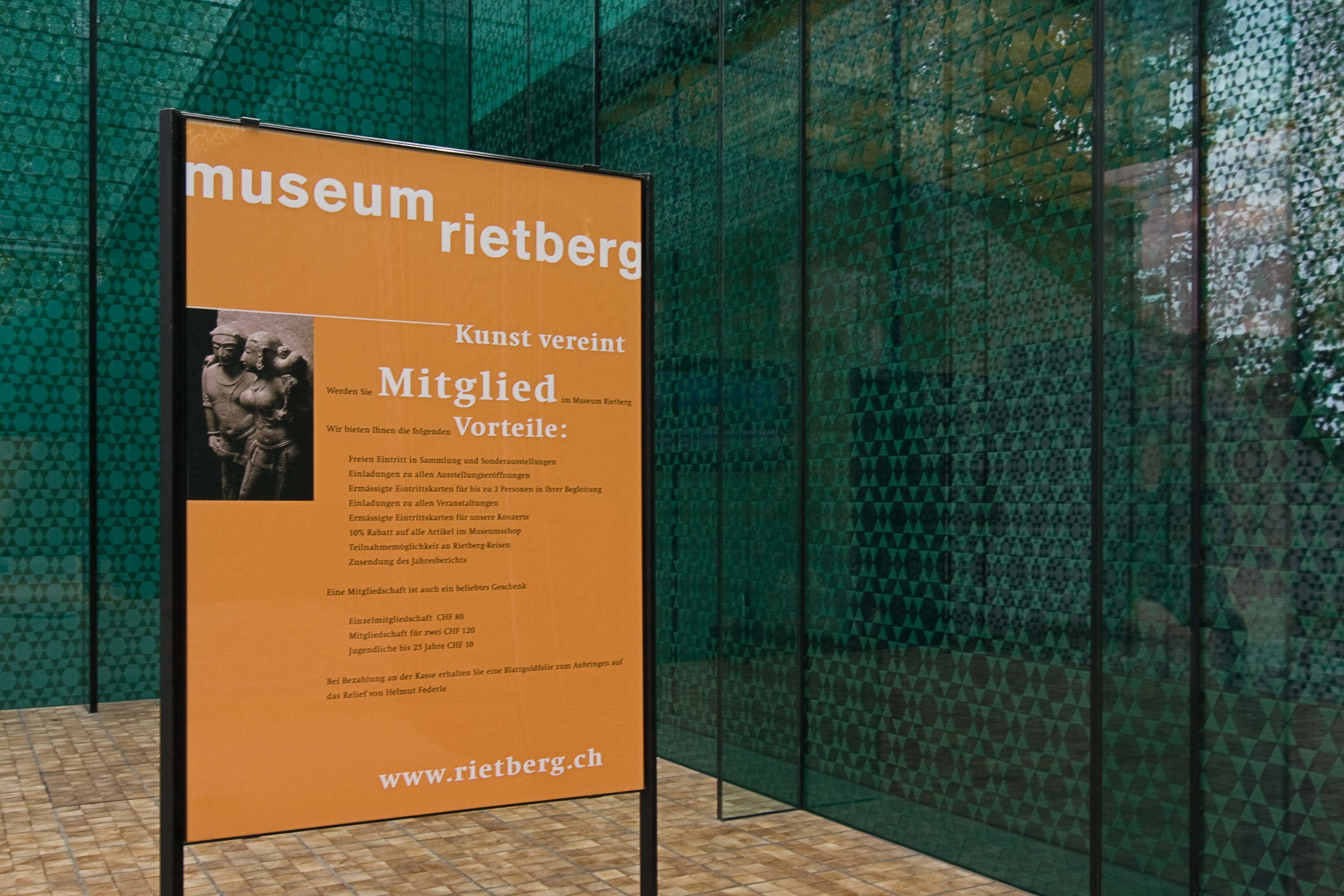 Eingangshalle des Neubauteils im Museum Rietberg in Zürich